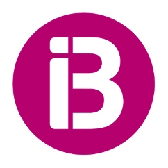 Imagen corporativa de la televisión autonómica de las Islas Baleares